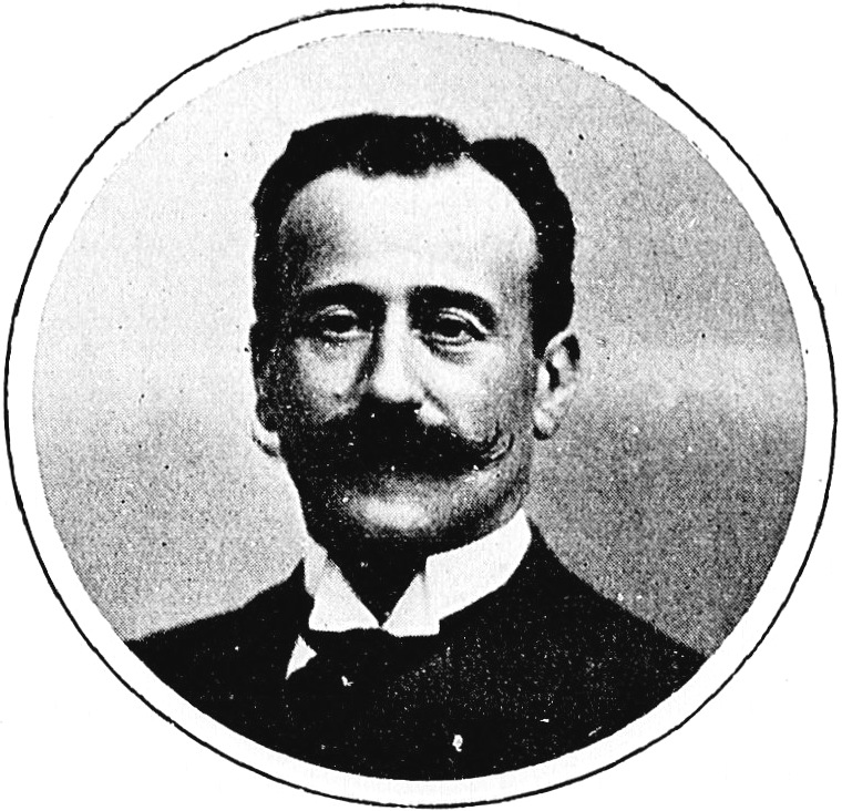 "Exposition coloniale nationale [de Marseille] - 15 avril-15 novembre 1906""M. A. Chanot, maire de Marseille".